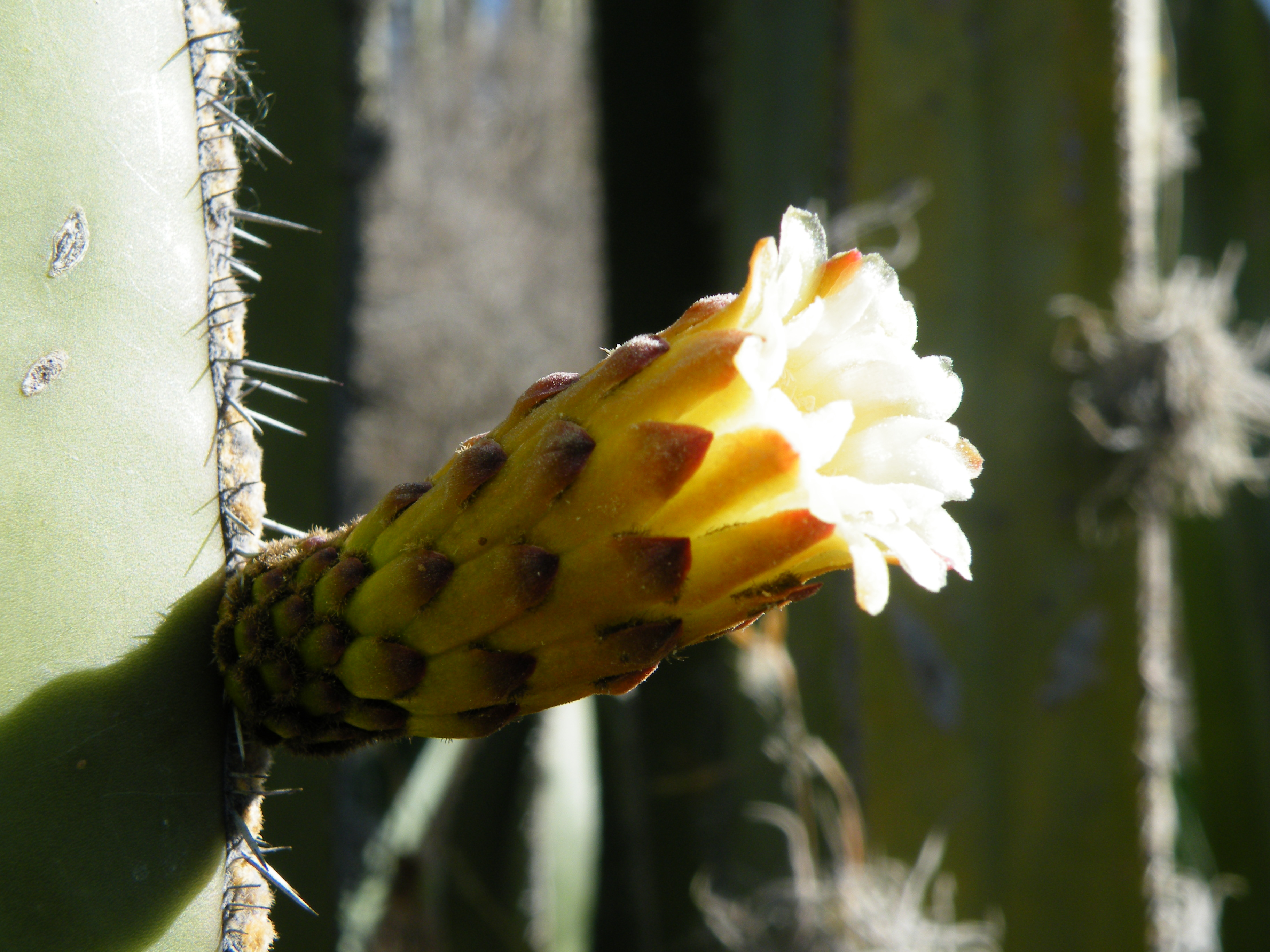 Doctor Arroyo, Nuevo Leon